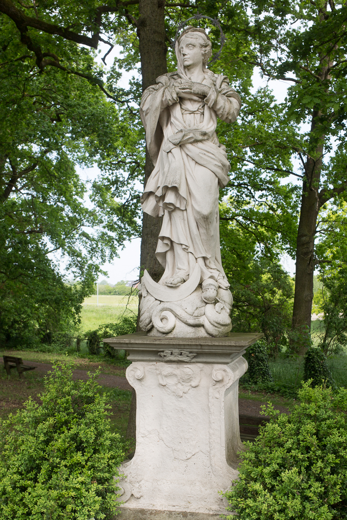 Immaculata am Haus Dieck, 2019